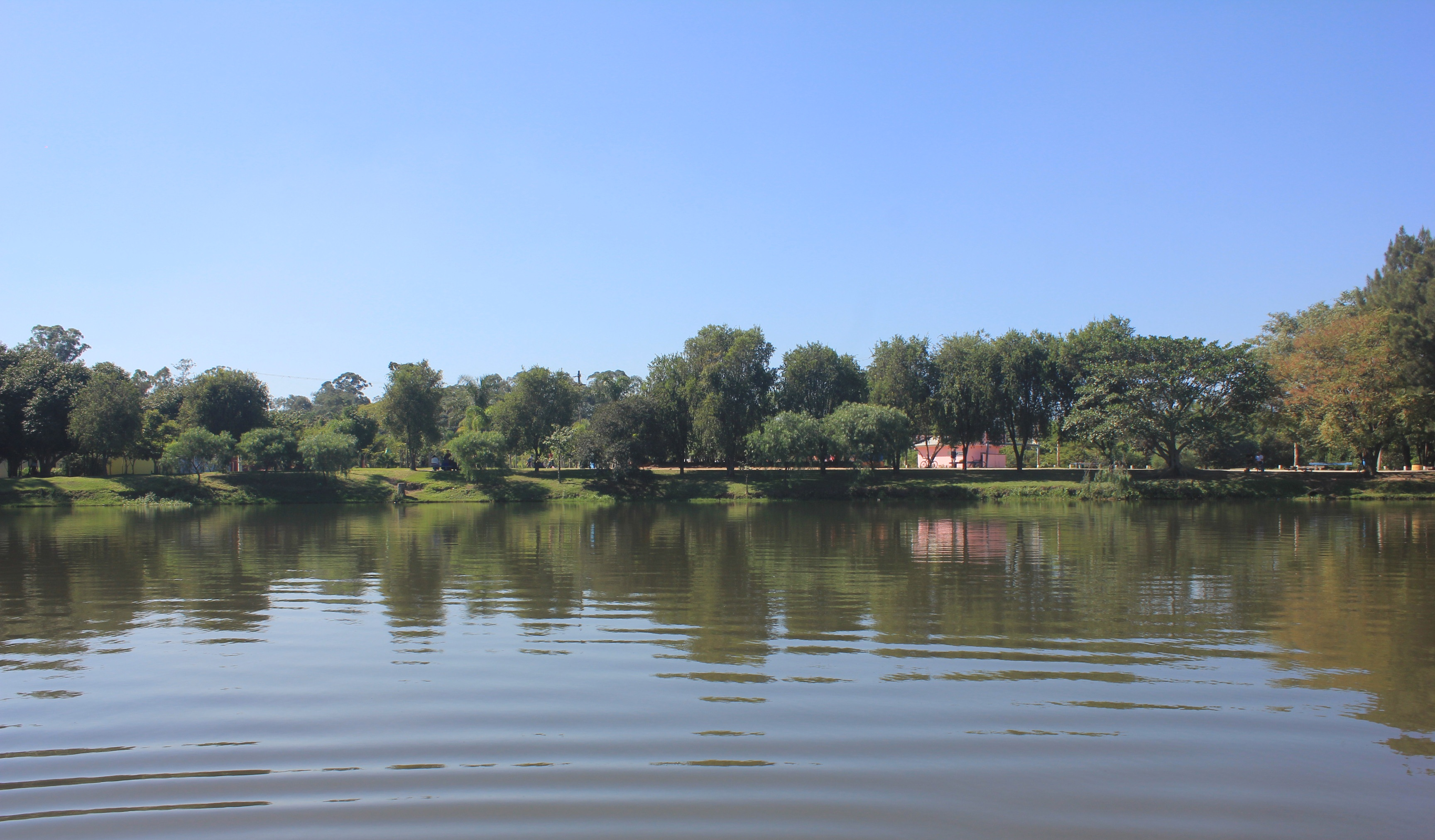 Lago dos pedalinhos - Entrada do Parque